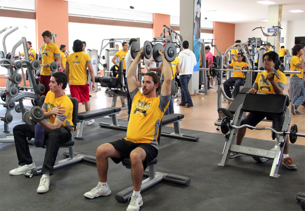 Gimnasio del ITESO